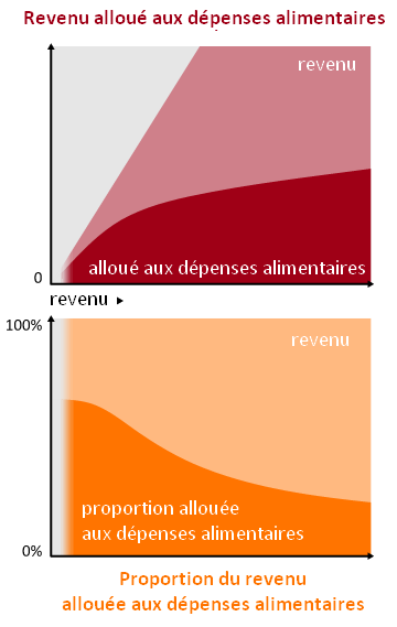 Traduction de File:EngelsLaw.svg, qui illustre la loi d'Engel.